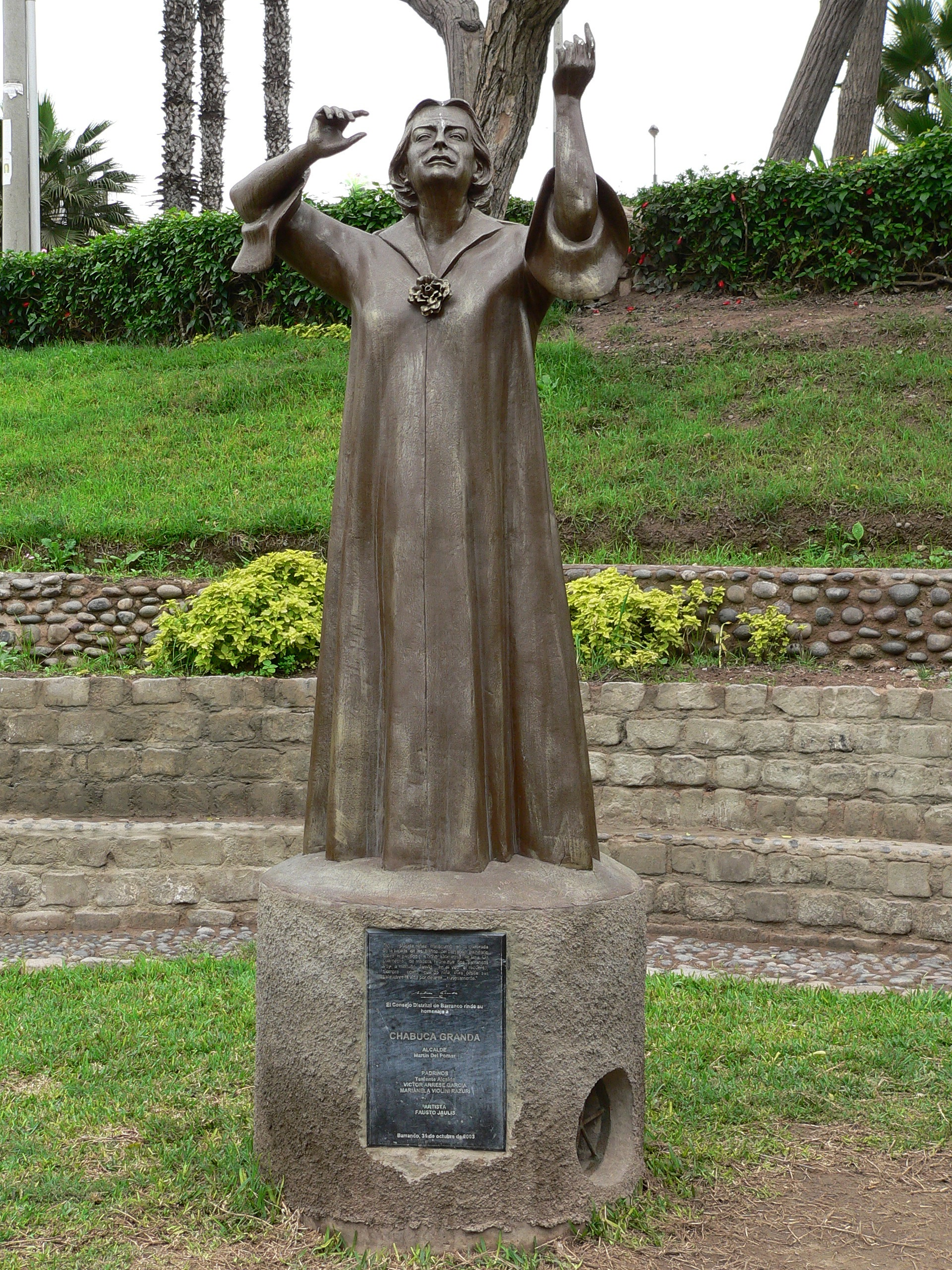 Estatua de Chabuca Granda situada en Barranco, Lima